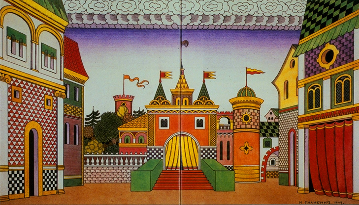 Иллюстрация Ивана Яковлевича Билибина (1876-1942)